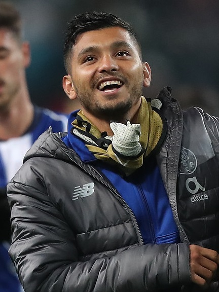 Jesús Manuel Corona con el Oporto en 2018.